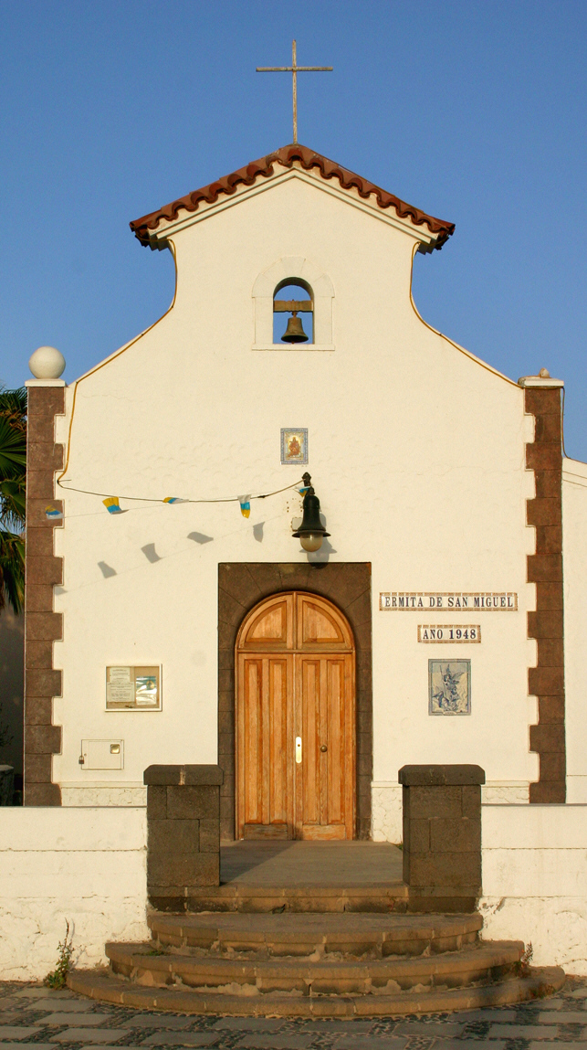 1948 war diese Kirche eines der ersten Gebäude in Morro Jable